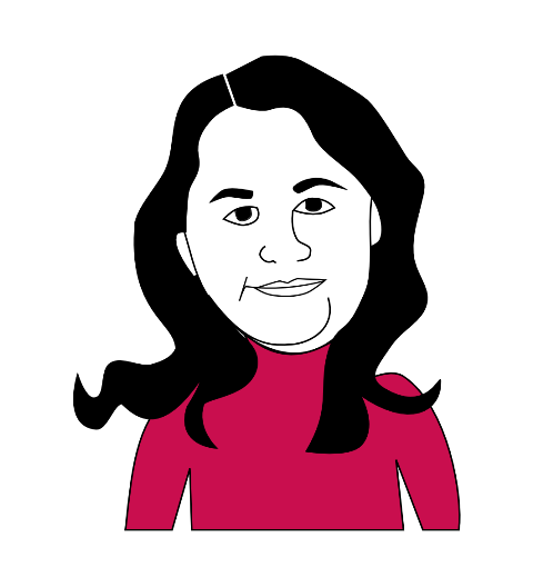 Lupe Gómez, caricatura en Tinta de Lura